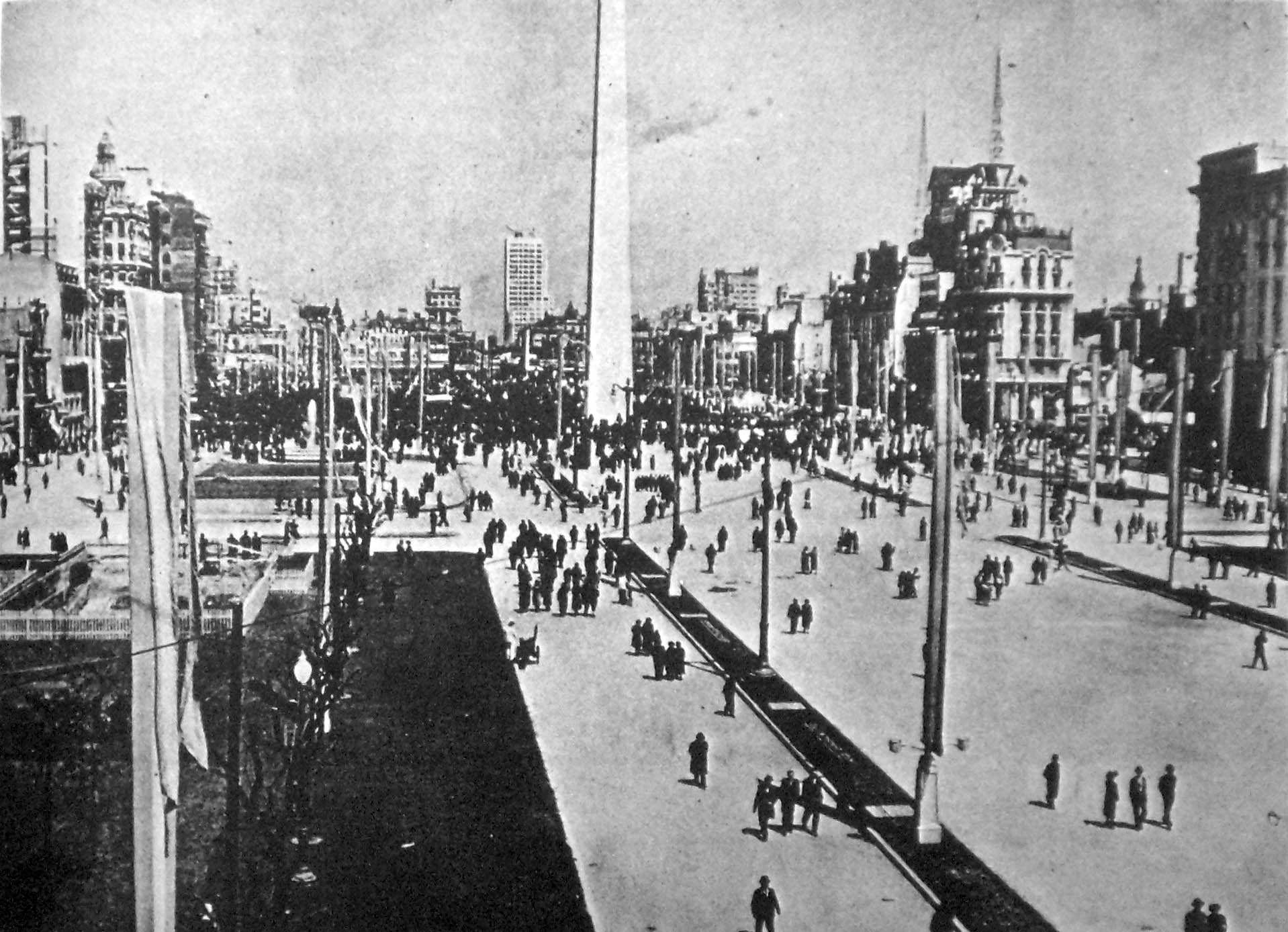 Avenida 9 de Julio el día de su inauguración.